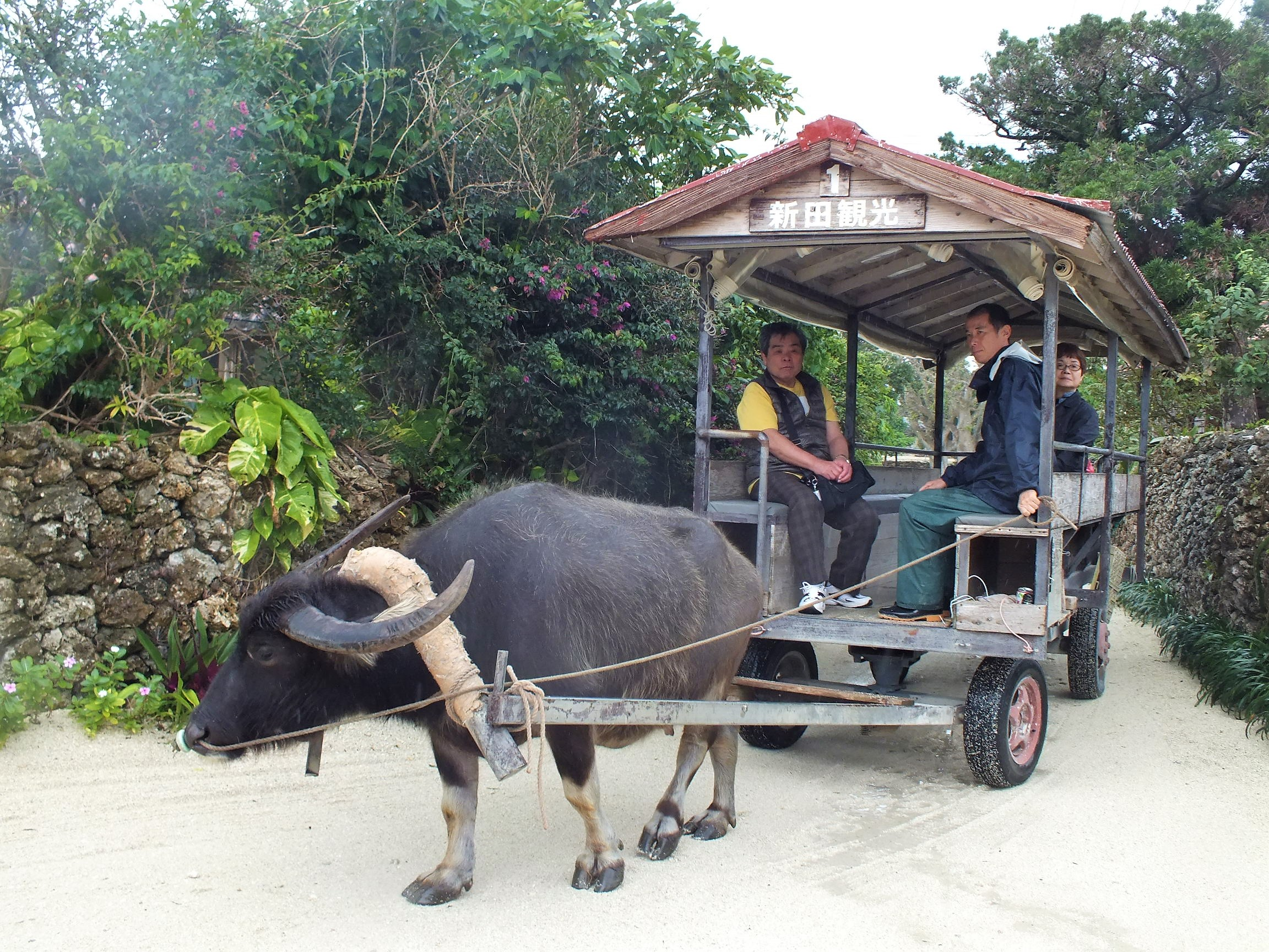 Water buffalo in Taketomijima,Nitta-kanko 新田観光水牛車 営業時間 AM８：３０ ～ PM５：００ 水牛車 始 発：AM９：００ 最終便：PM４：００ ※所要時間３０分程度